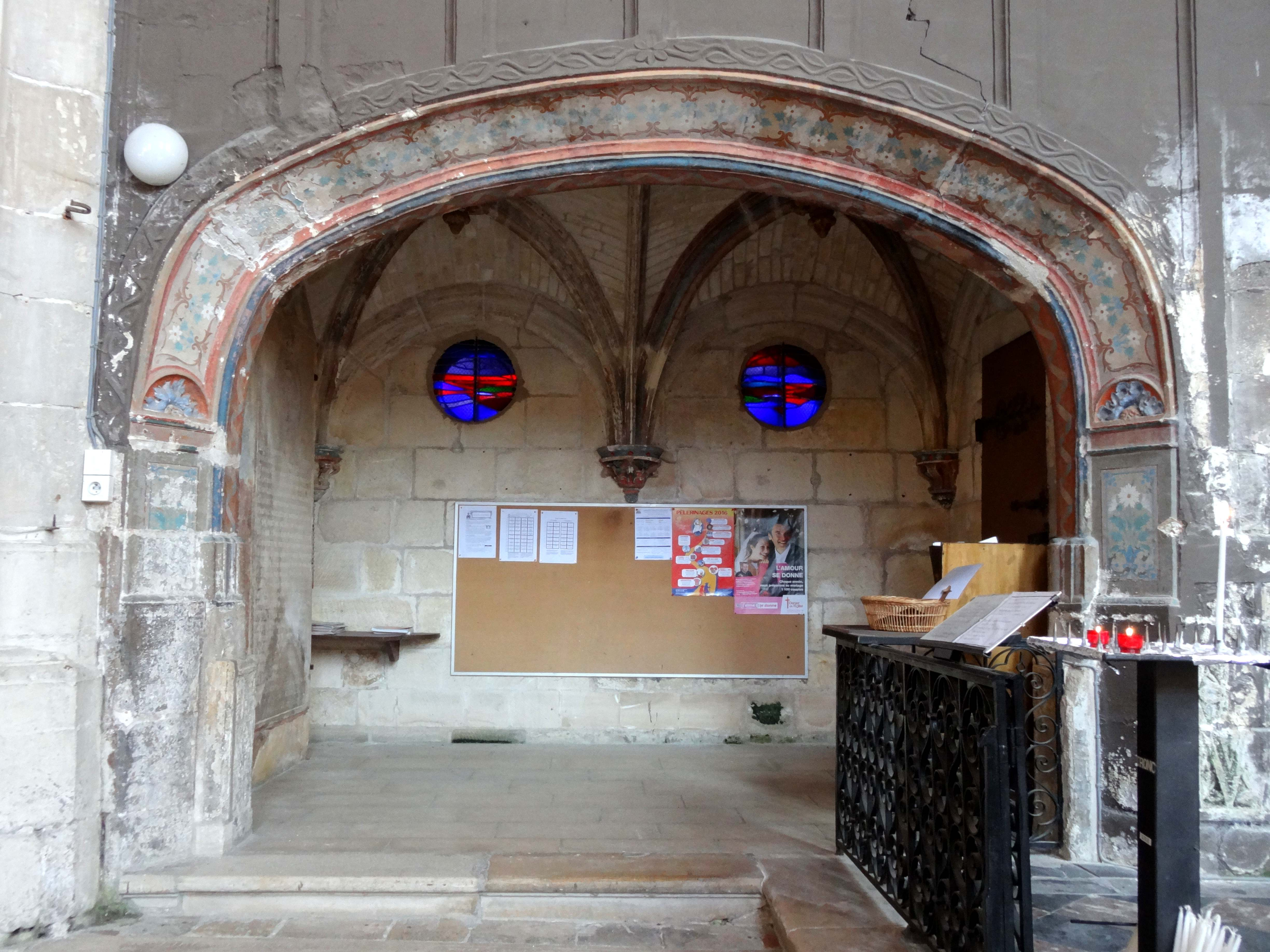 Intérieur de l'église - voir titre.